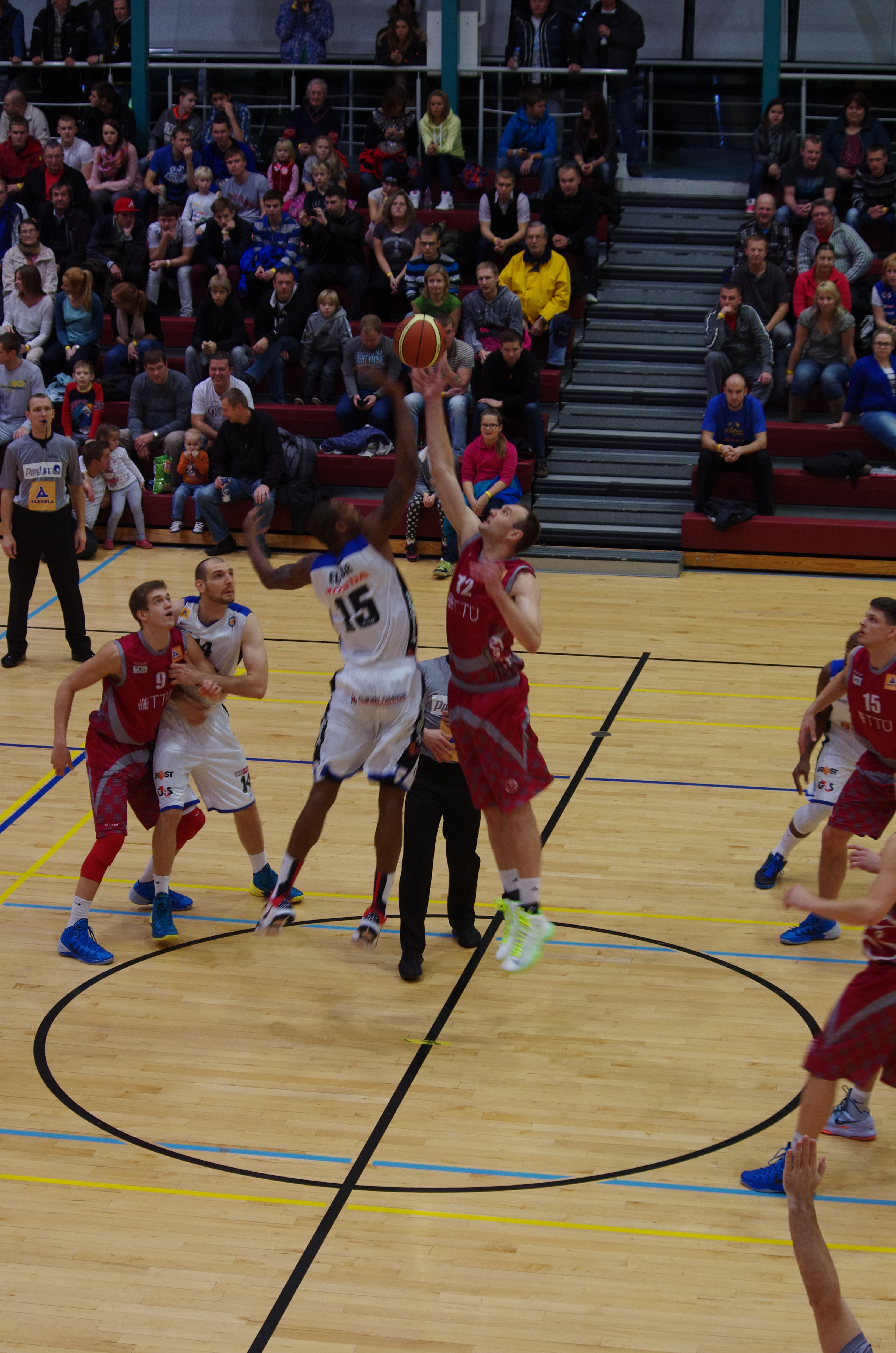 Korvpallivõistlus Keilas.